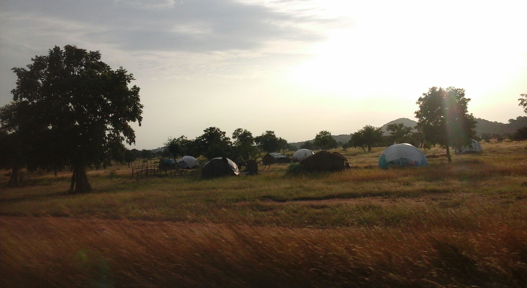 A rich region of Arabic gum and fruits. مصرى: منطقة غنية جدا بالصمغ العربي والكثير من الفواكه النادرة This is an image with the theme "Africa on the Move or Transport" from: Sudan